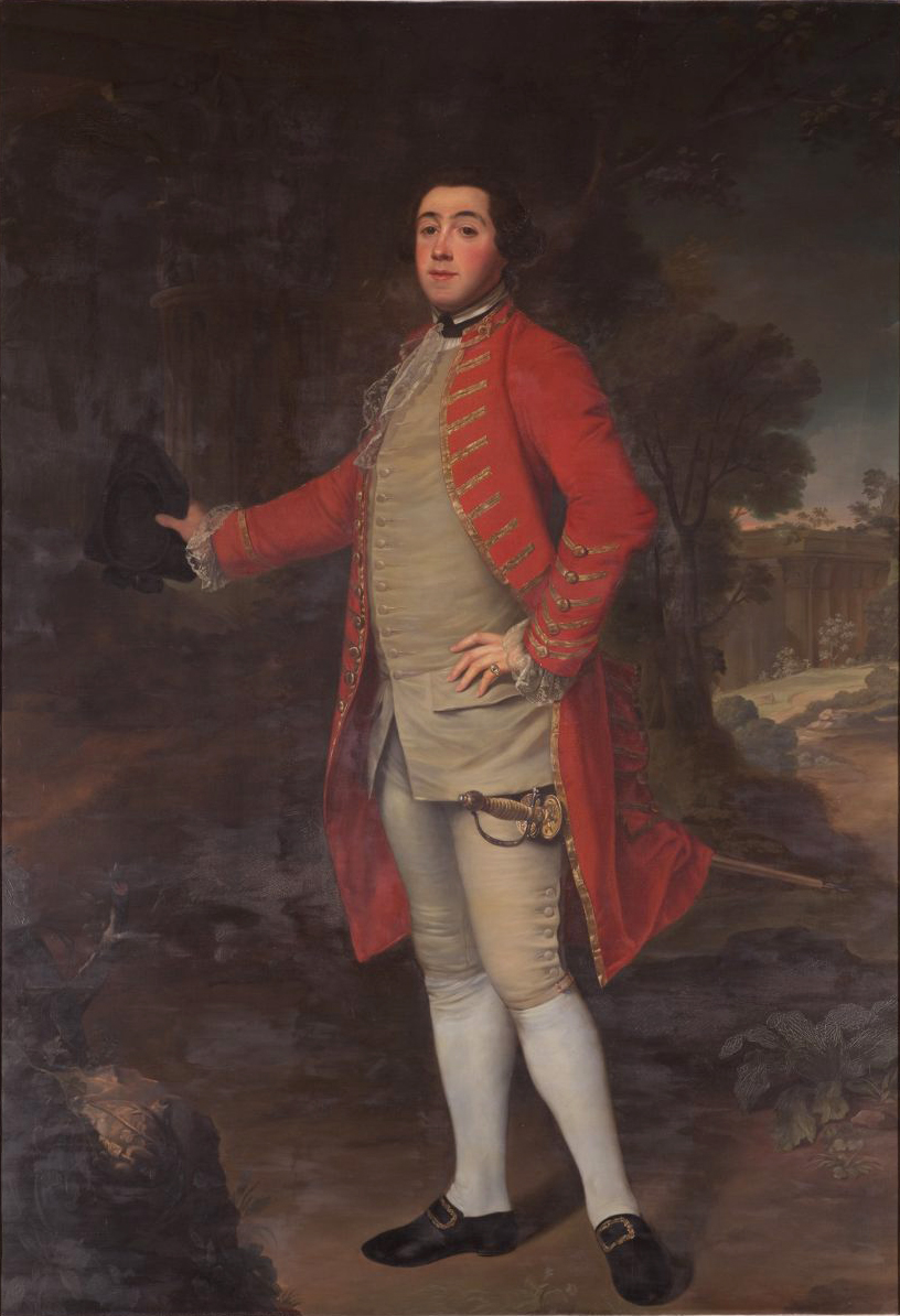 Leopold Friedrich Franz von Anhalt-Dessau, Kopie von Wilhelm Hartkopf nach dem Original von Anton von Maron aus dem Jahre 1766